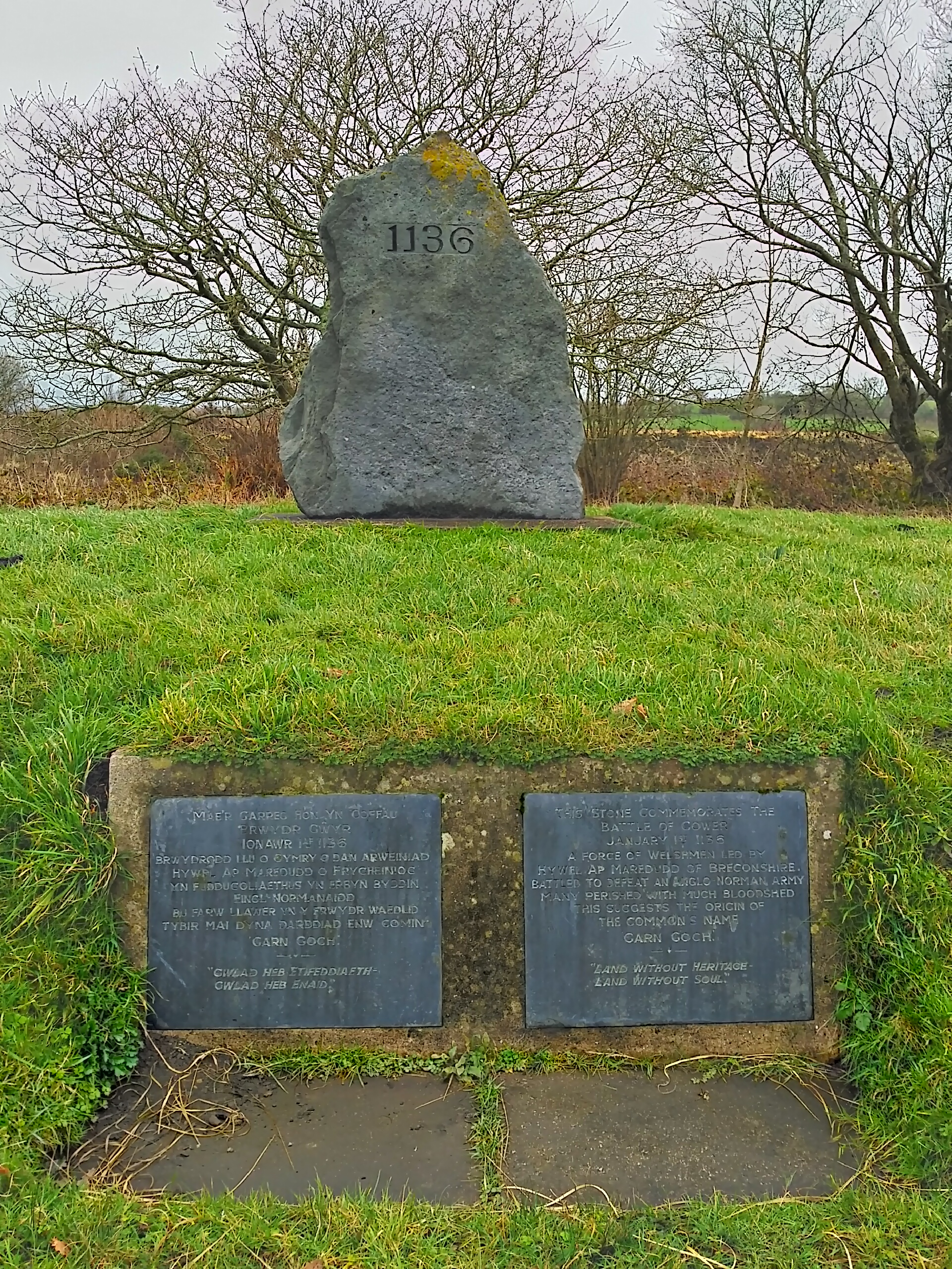 Cofeb Brwydr Garn Goch gyda'r Llechfeini'n datgan yr hanes